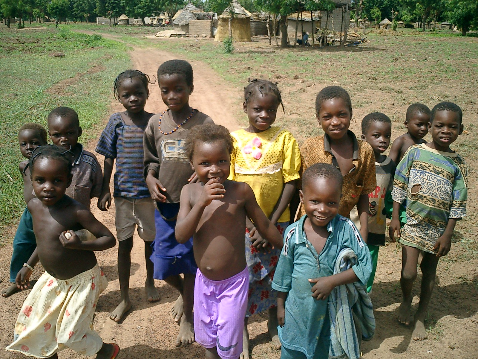 childen in dourtenga, burkina faso